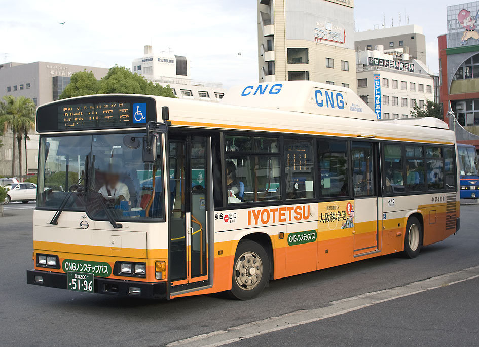 伊予鉄道 レインボーCNG ノンステップ PDG-HR7JPBE改